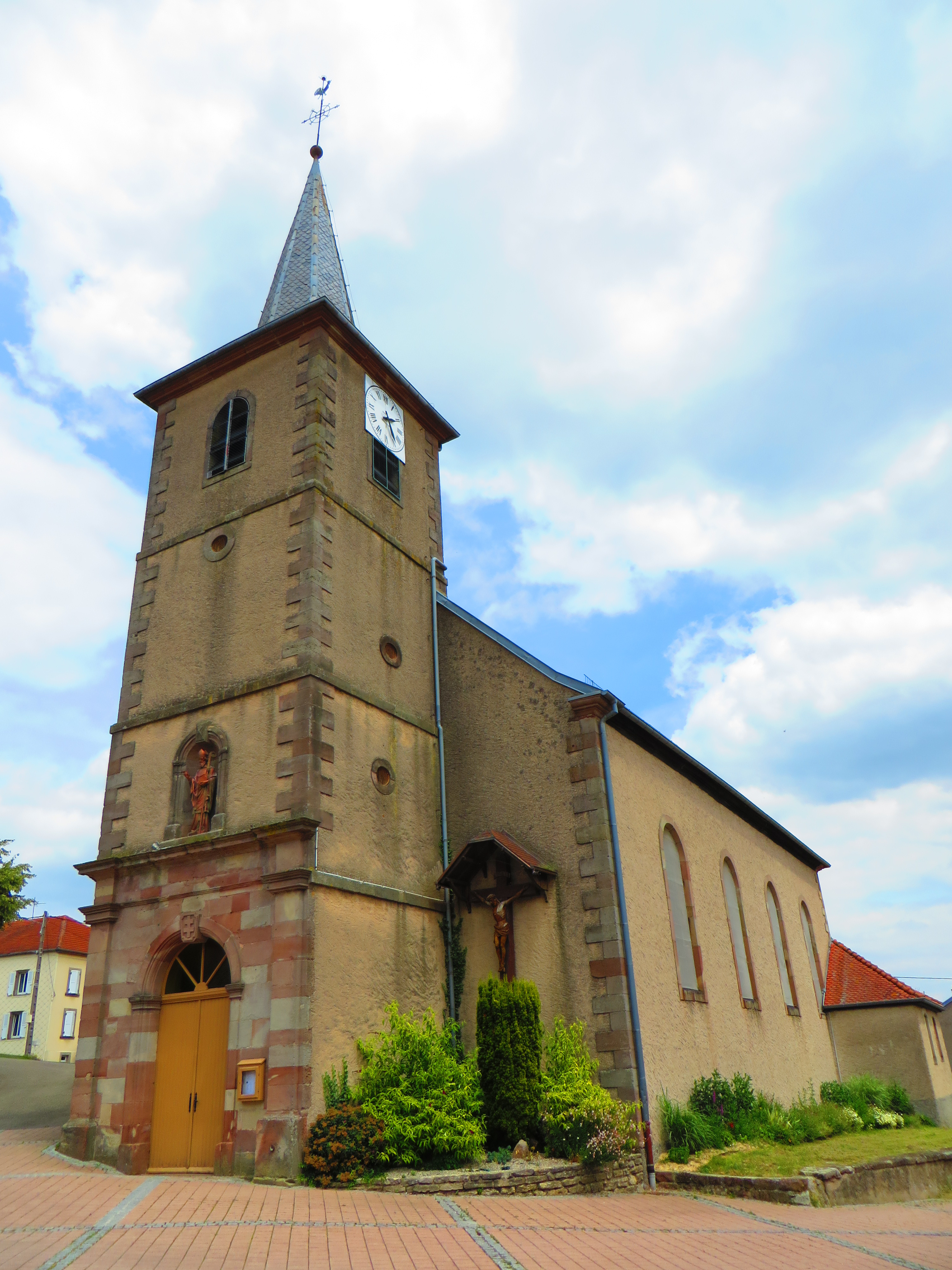 Haut Clocher Église Saint-Séverin